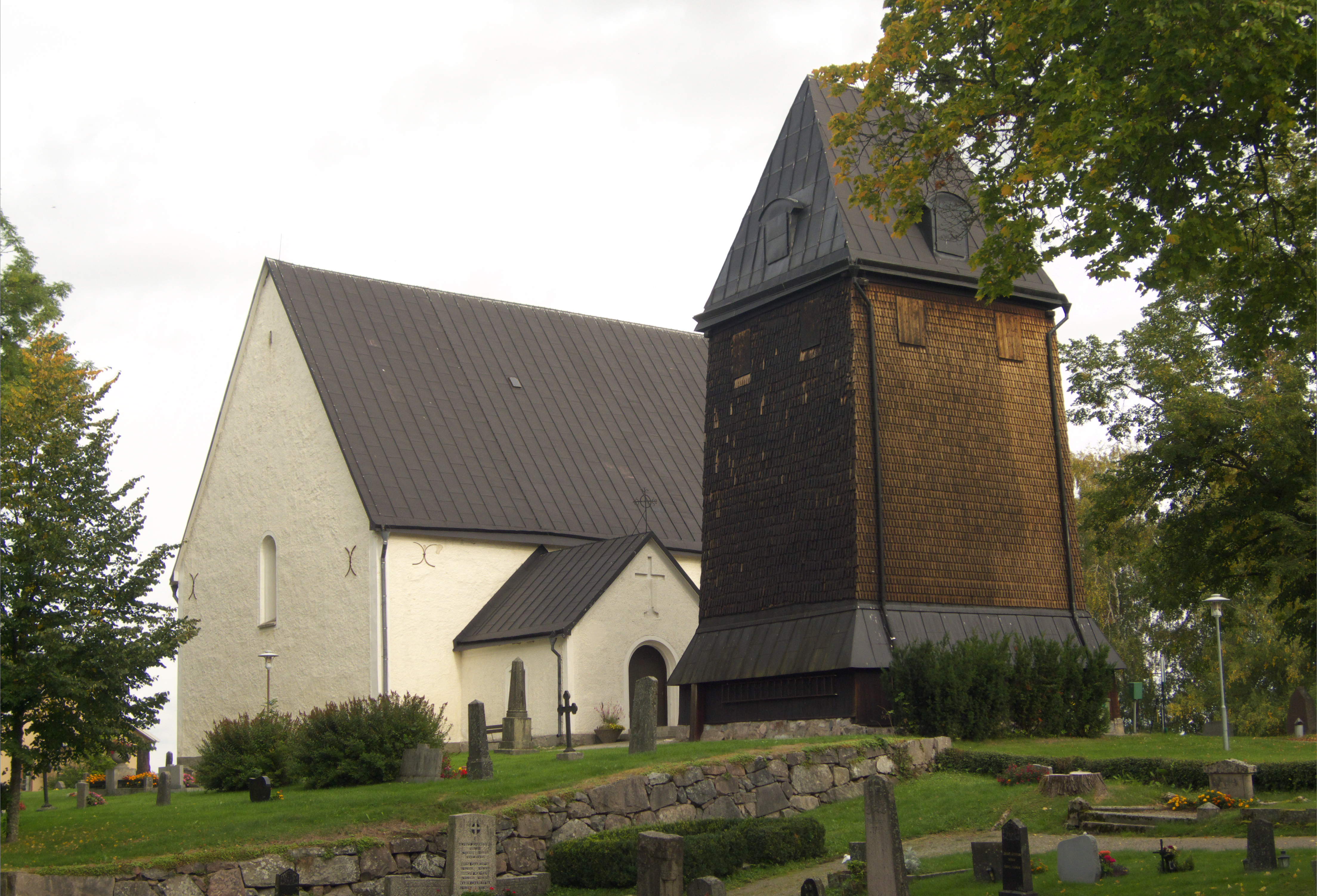 Klockstapeln vid Svedvi kyrka, Västerås stift